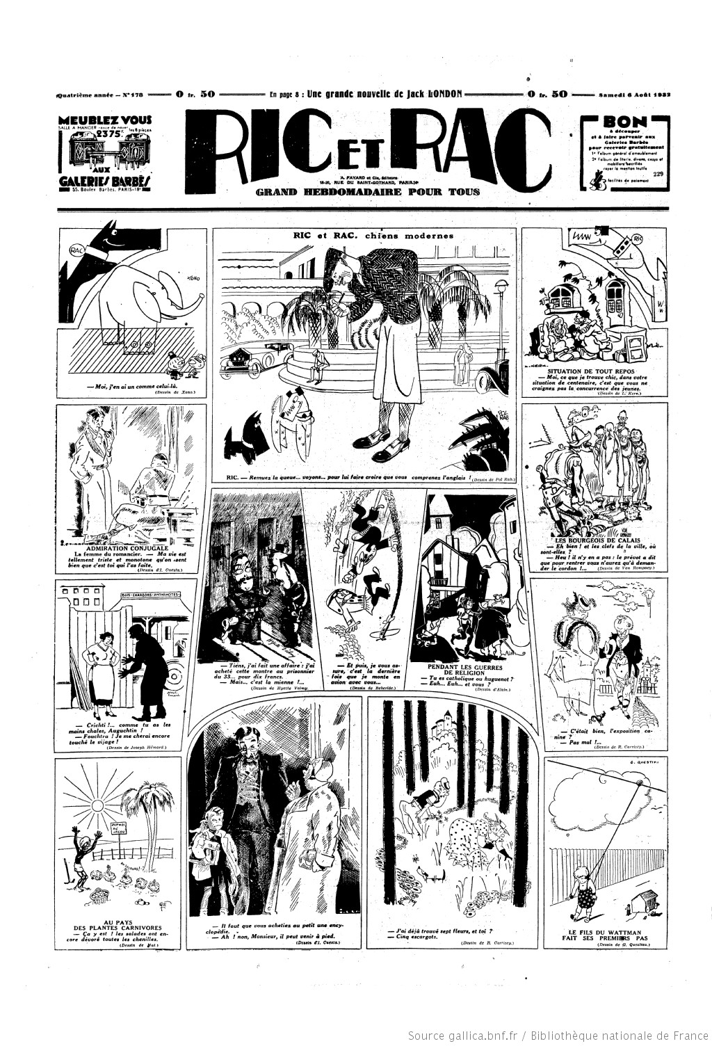 Journal Ric et Rac du 6 août 1932